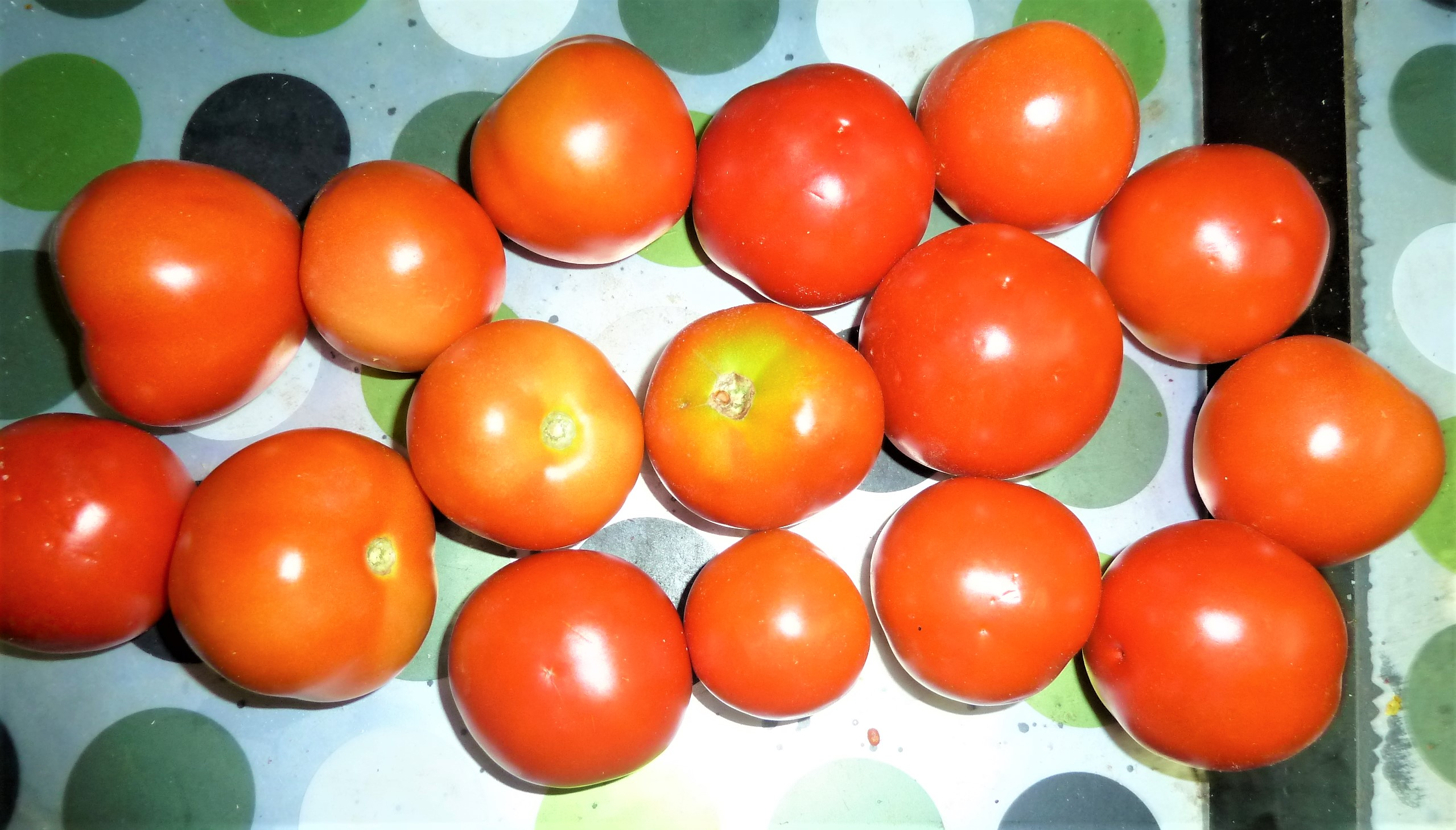 టమాటాలు